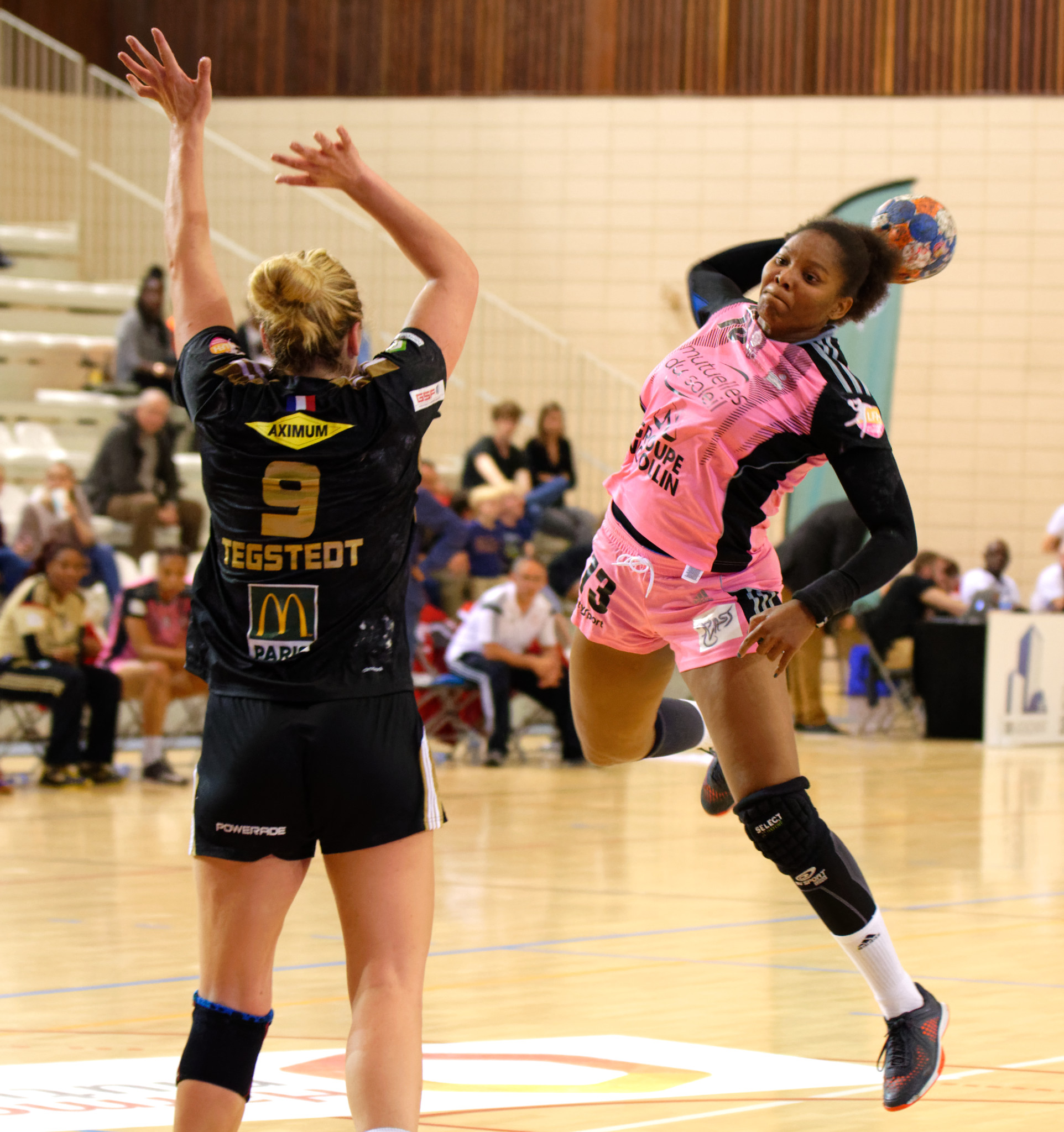 Rencontre de playoff pour la place 3 et 4 entre Issy Paris Hand et Nice. A Issy Les Moulineaux, le 28 mai 2016.